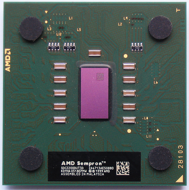 Beschreibung: AMD Sempron 2200+ / 1500 MHz (Thorton core) Fotograf: Darkone, 22. Juli 2005